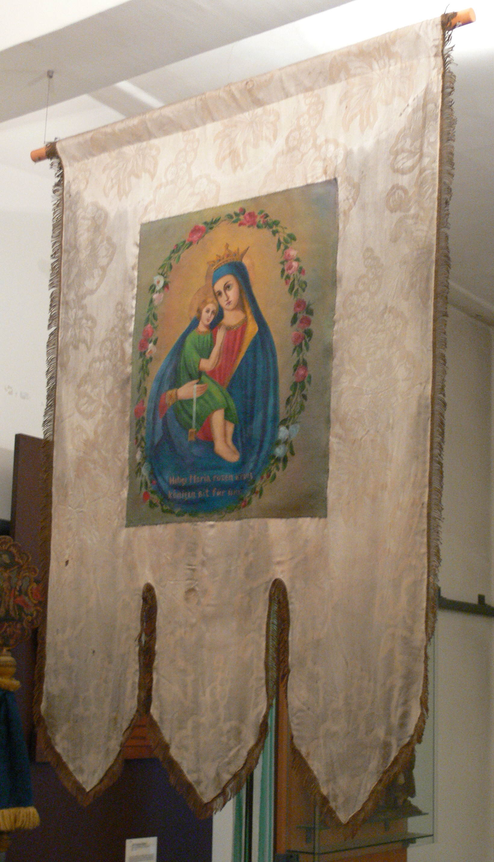 Prozessionsfahne, Ungarn oder Balkan, um 1880 (spätere Umarbeitungen) Wien, Österreichisches Museum für Volkskunde